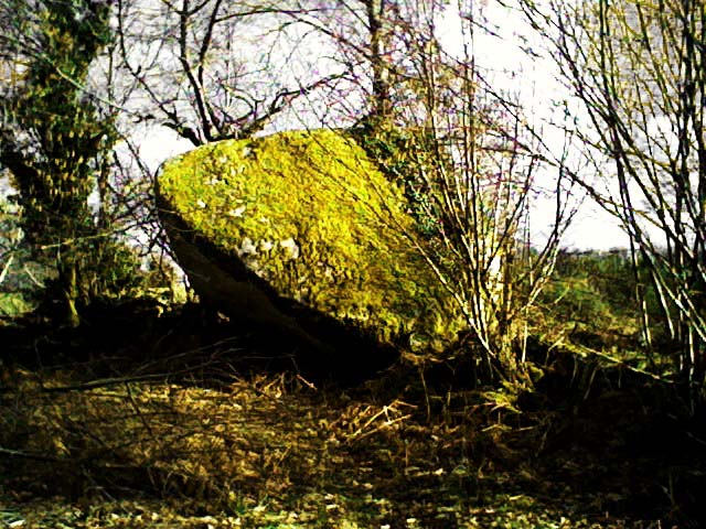 A 500 mètres du hameau de "la Couffrette)